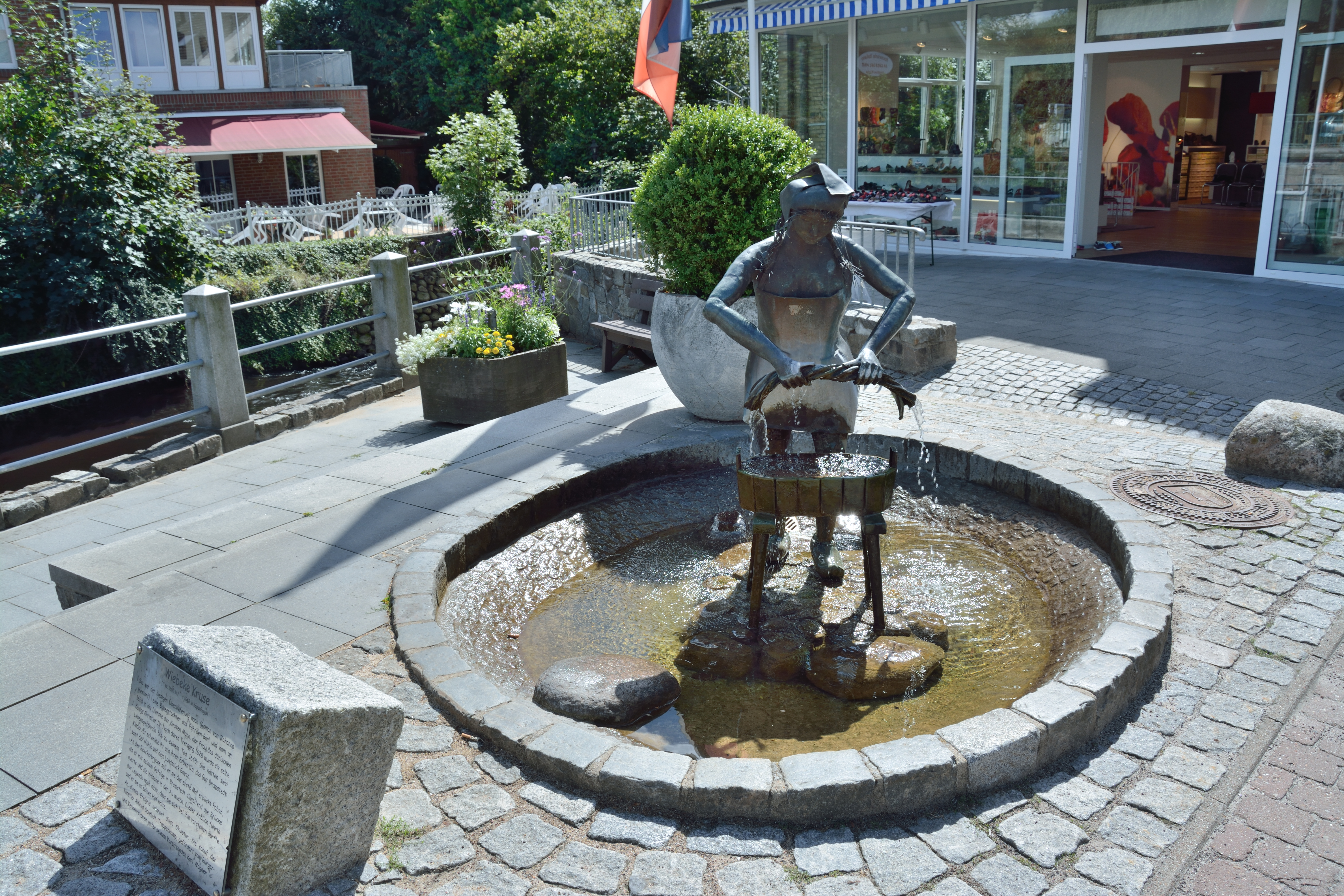 Bad Bramstedt, Denkmal Wibeke Kruse